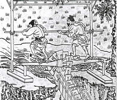 龍骨水車，又稱翻車、踏車。